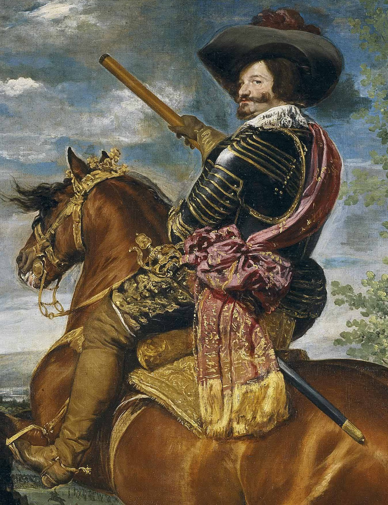 Retrato ecuestre de Gaspar de Guzmán y Pimentel (1587-1645), conde-duque de Olivares y valido del rey Felipe IV de España hasta que cayó en desgracia en 1643.